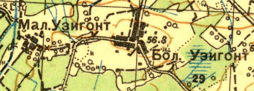 Топографическая карта Ленинградской области, квадрат О-35-12-Г (Ропша), деревня Узигонты